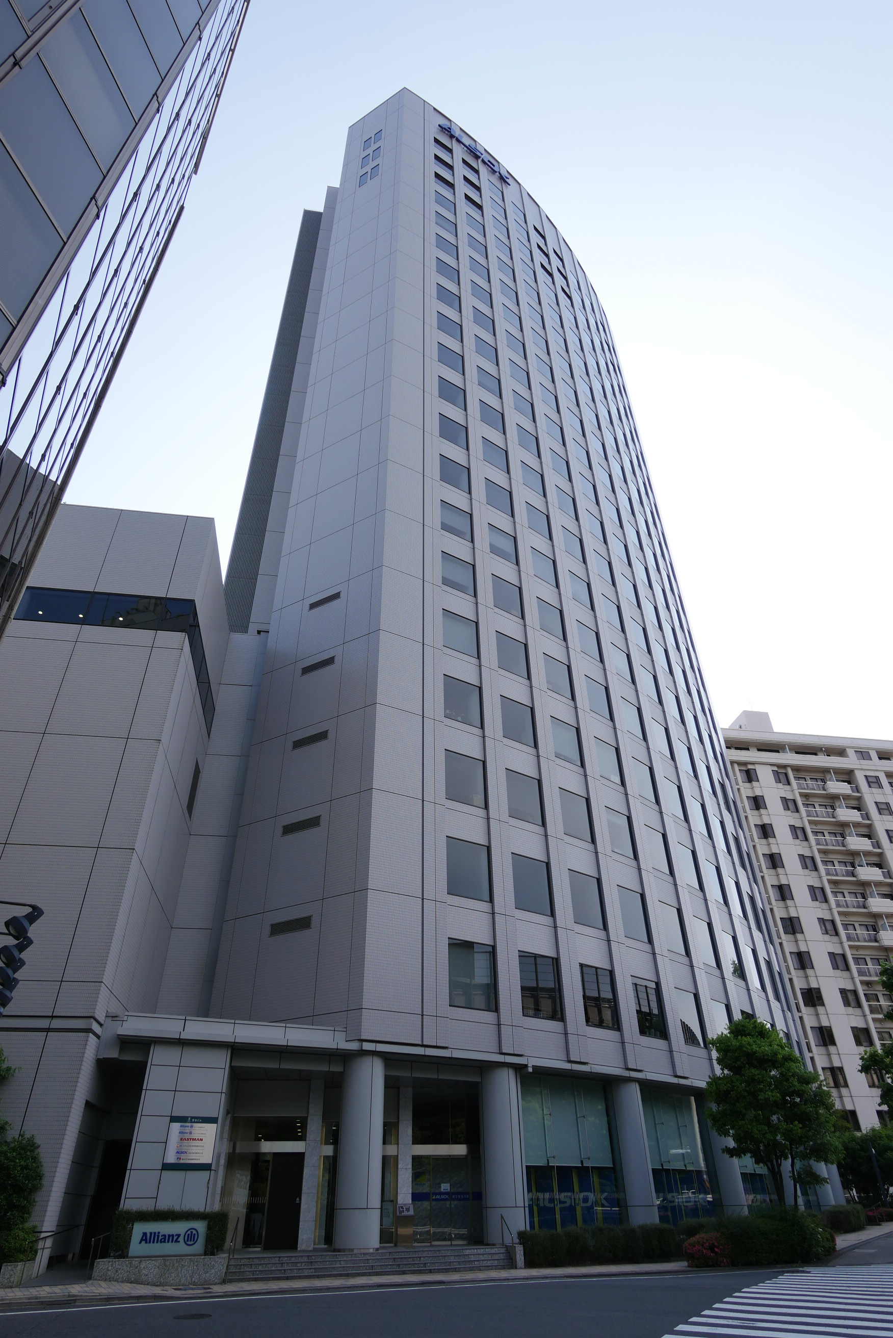 ALSOK本社（安全ビル）